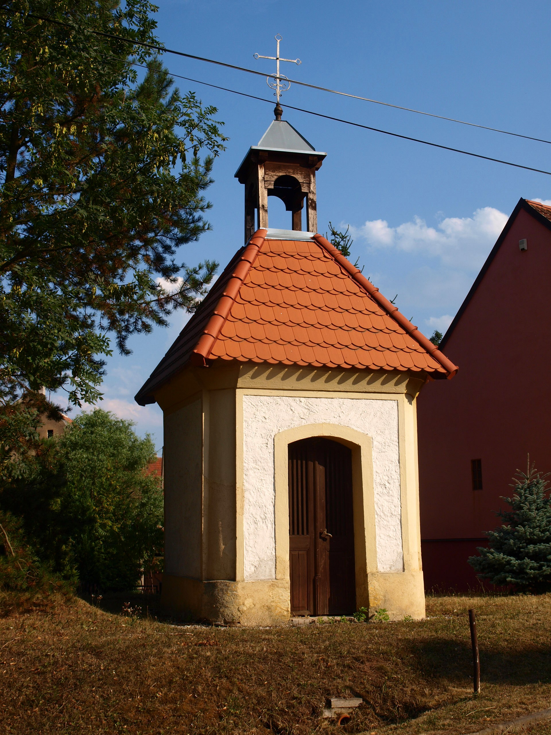 Povlčín, kaplička